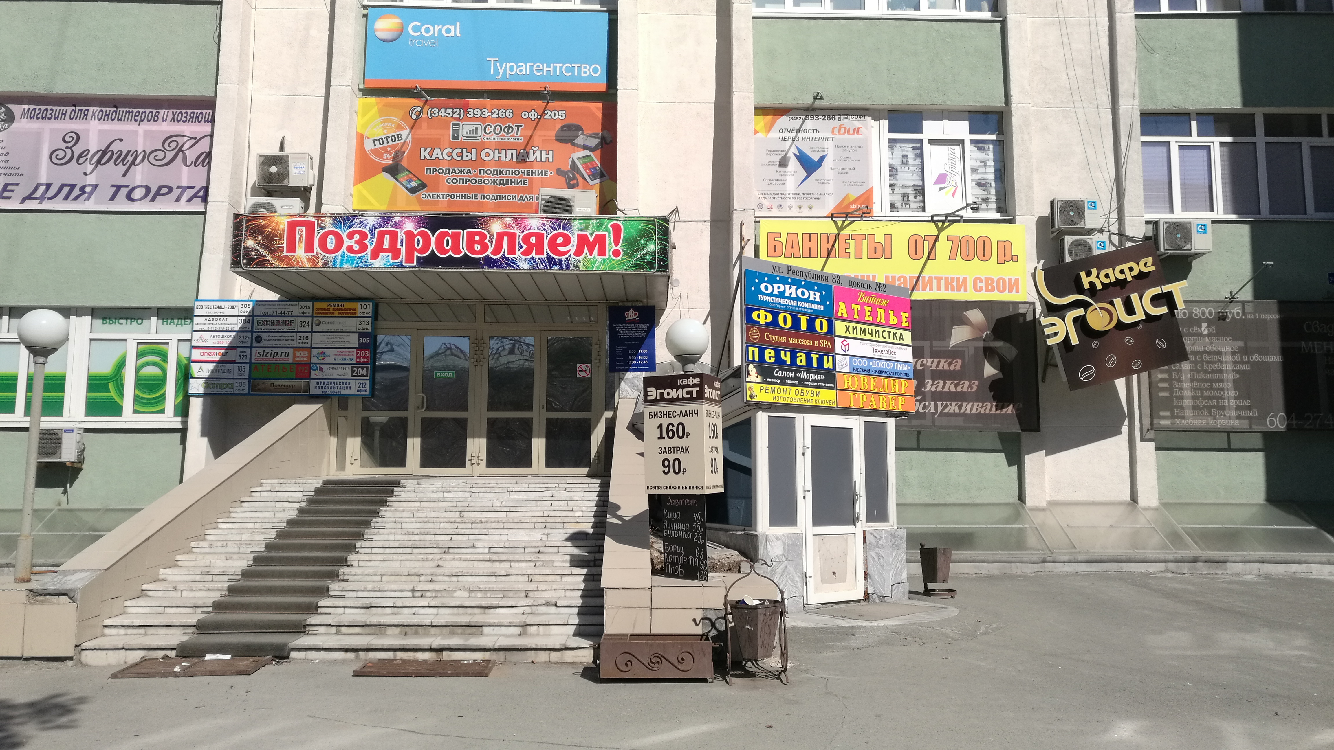 Strato Respubliko. Tjumeno, Rusio.